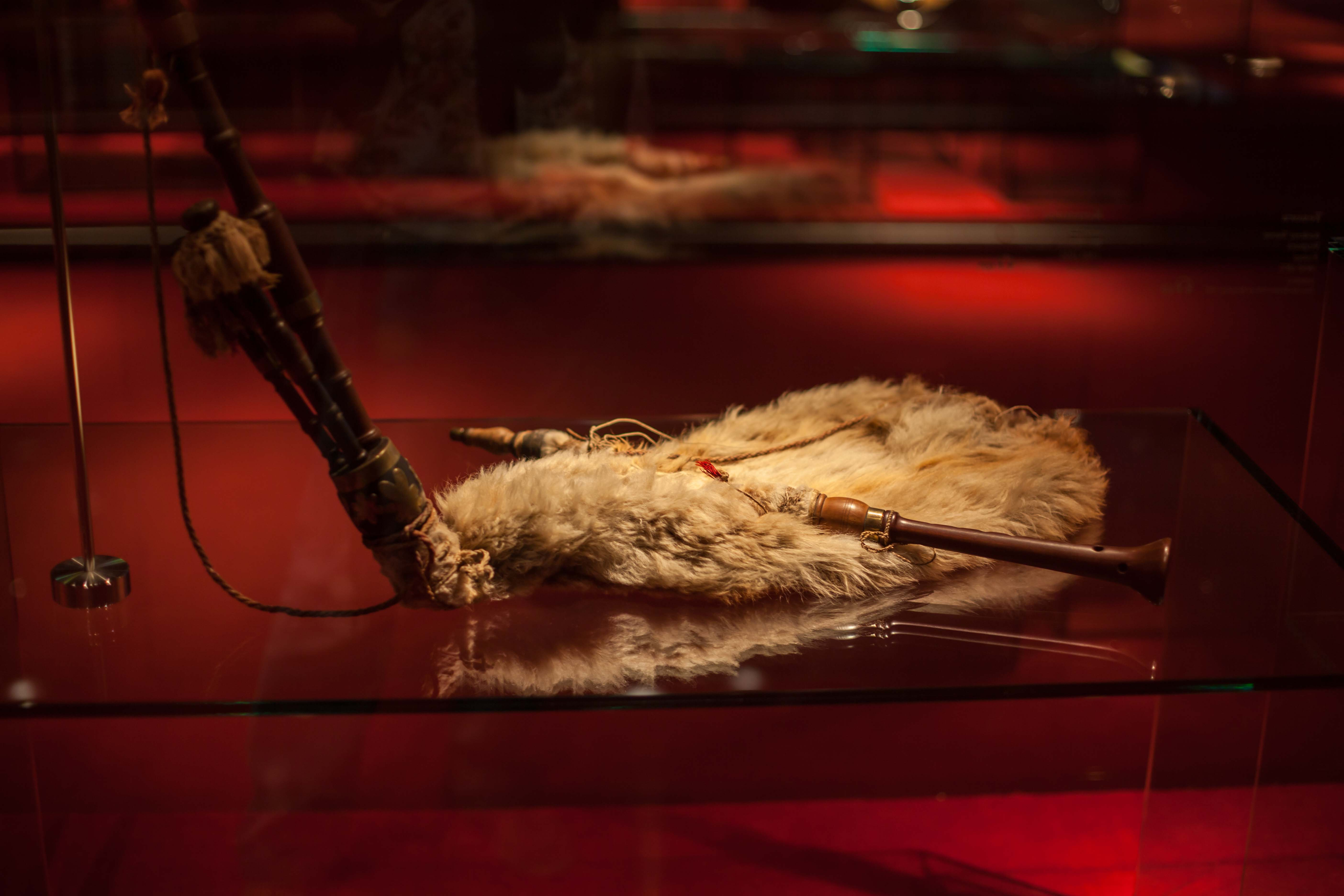 Xeremies de Mallorca, sac de pell amb pèl d'ovella, MDMB 691 Museu de la Música de Barcelona, aeròfon de llengüeta senzilla i doble.